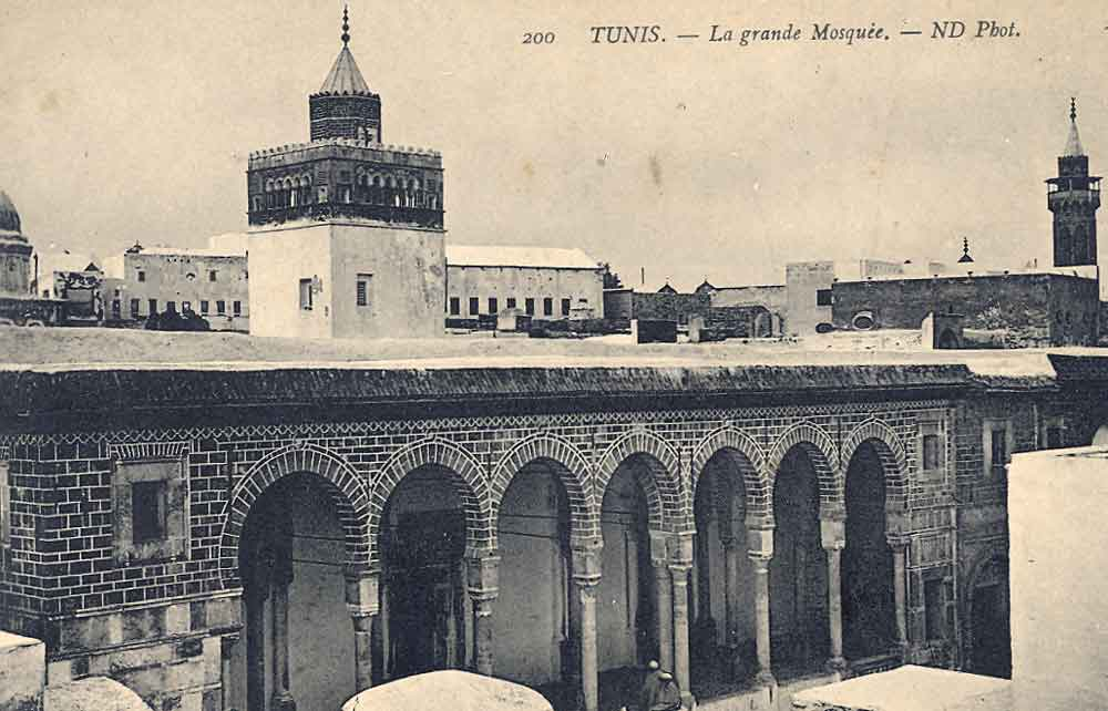 Au dessus de l'entrée ,l'ancien minaret de la Zitouna - 1880 Collection particulière Bertrand Bouret